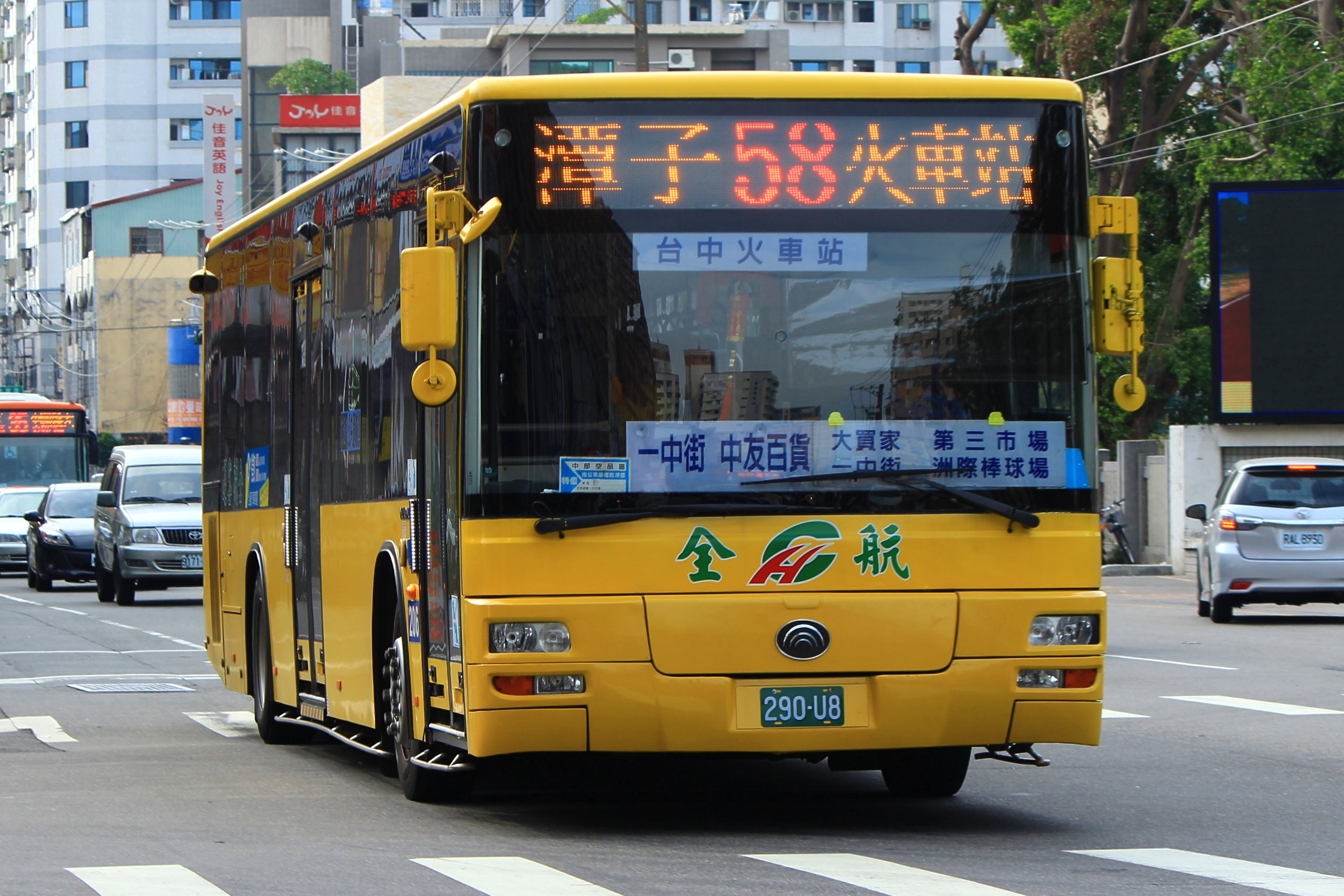 58 台中高工(高工路)